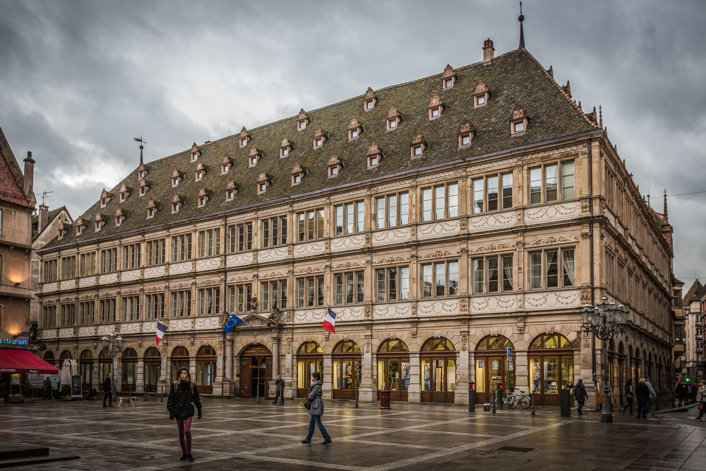 Strasbourg place Gutenberg, la Chambre de commerce et d'industrie novembre 2013.